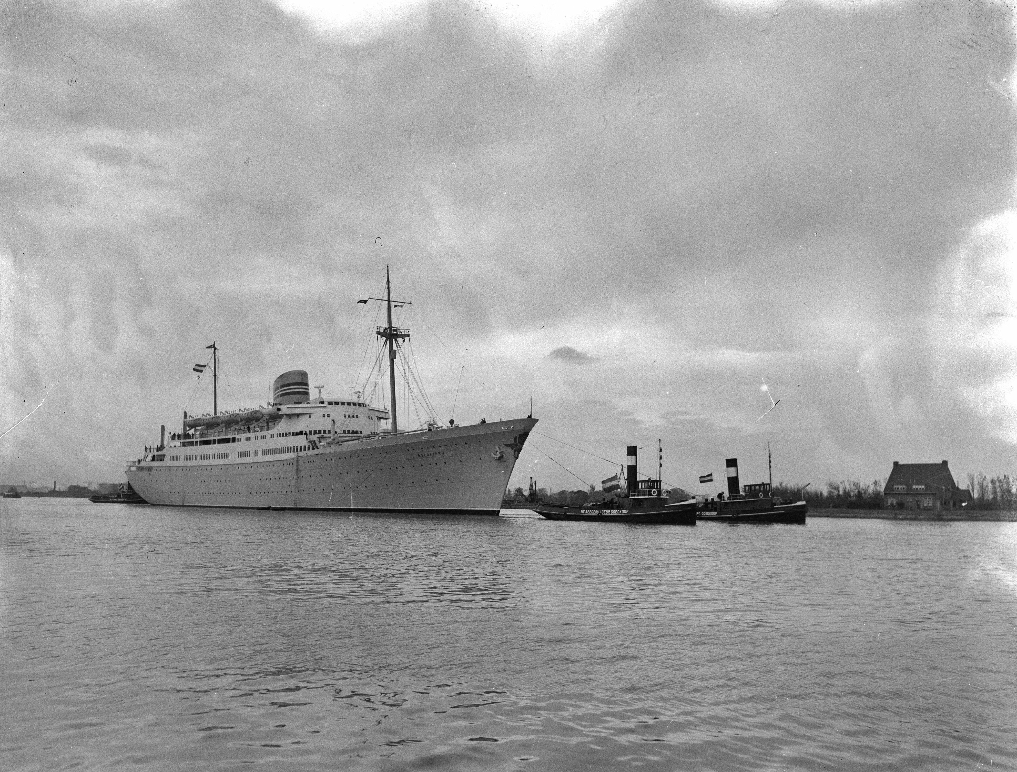 Collectie / Archief : Fotocollectie Anefo Reportage / Serie : [ onbekend ] Beschrijving : Oslofjord in Noordzeekanaal. Van Hamburg naar Oslo Datum : 11 november 1949 Locatie : Hamburg, Noordzeekanaal, Oslo Trefwoorden : schepen Persoonsnaam : Olsofjord Fotograaf : Vermorken, […] / Anefo Auteursrechthebbende : Nationaal Archief Materiaalsoort : Negatief (zwart/wit) Nummer archiefinventaris : bekijk toegang 2.24.01.04 Bestanddeelnummer : 903-7053